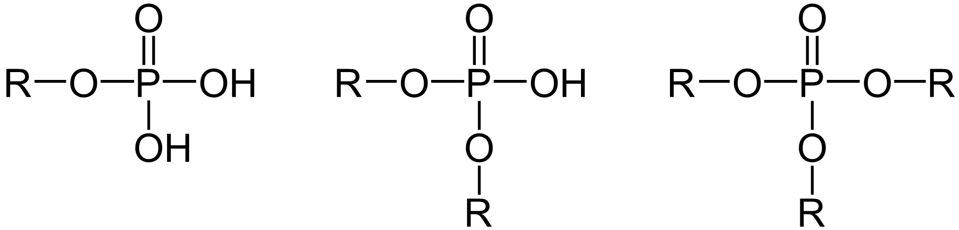 Mono-, di-, tri-Phosphorsäureester